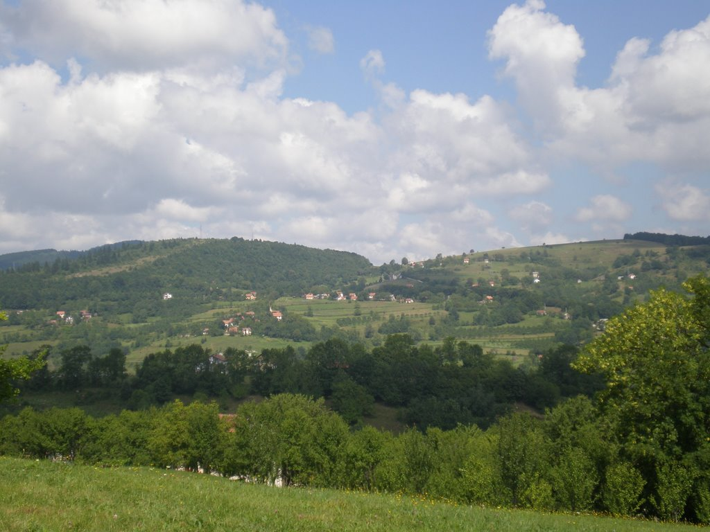 Pogled na selo Stupari sa Brda. Opština Mrkonjić Grad.